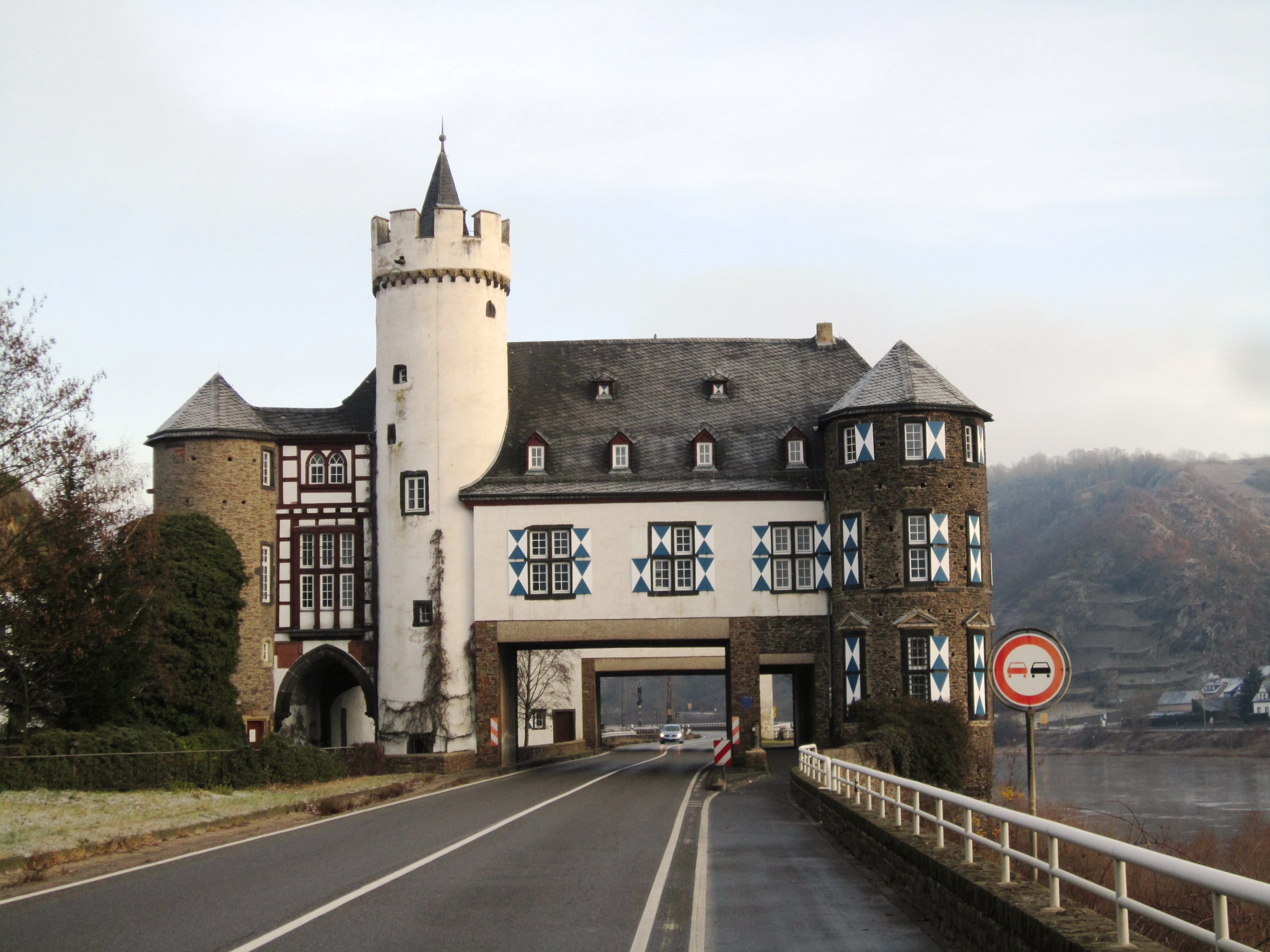 Schloss Gondorf - Oberburg